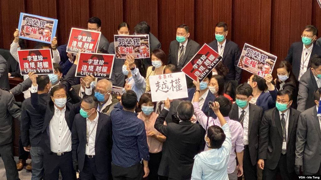 香港立法会内务委员会会议“闹双胞”，上届主席李慧琼被民主派议员质疑非法主持会议，爆发冲突